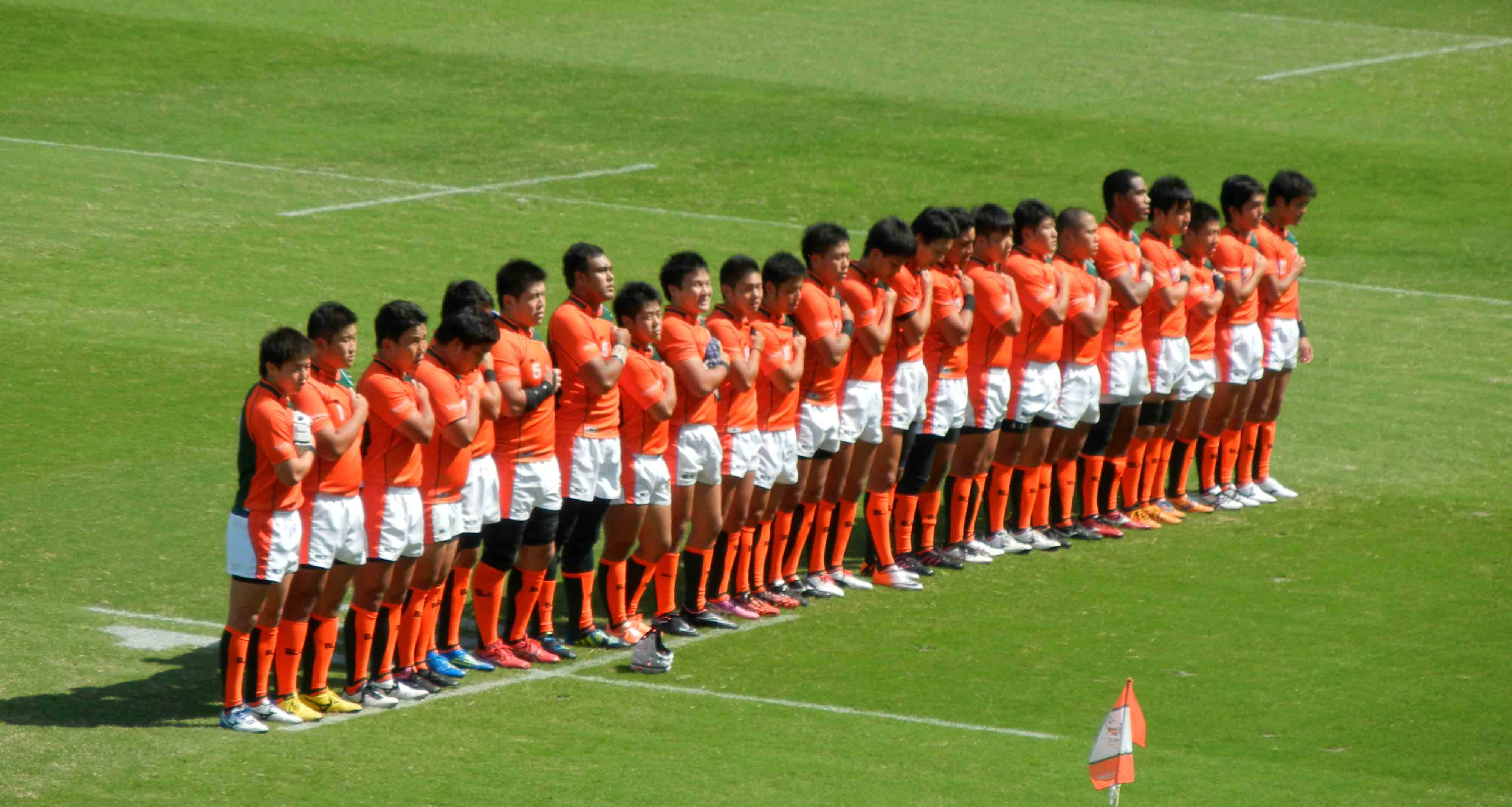 試合前の立正の選手達